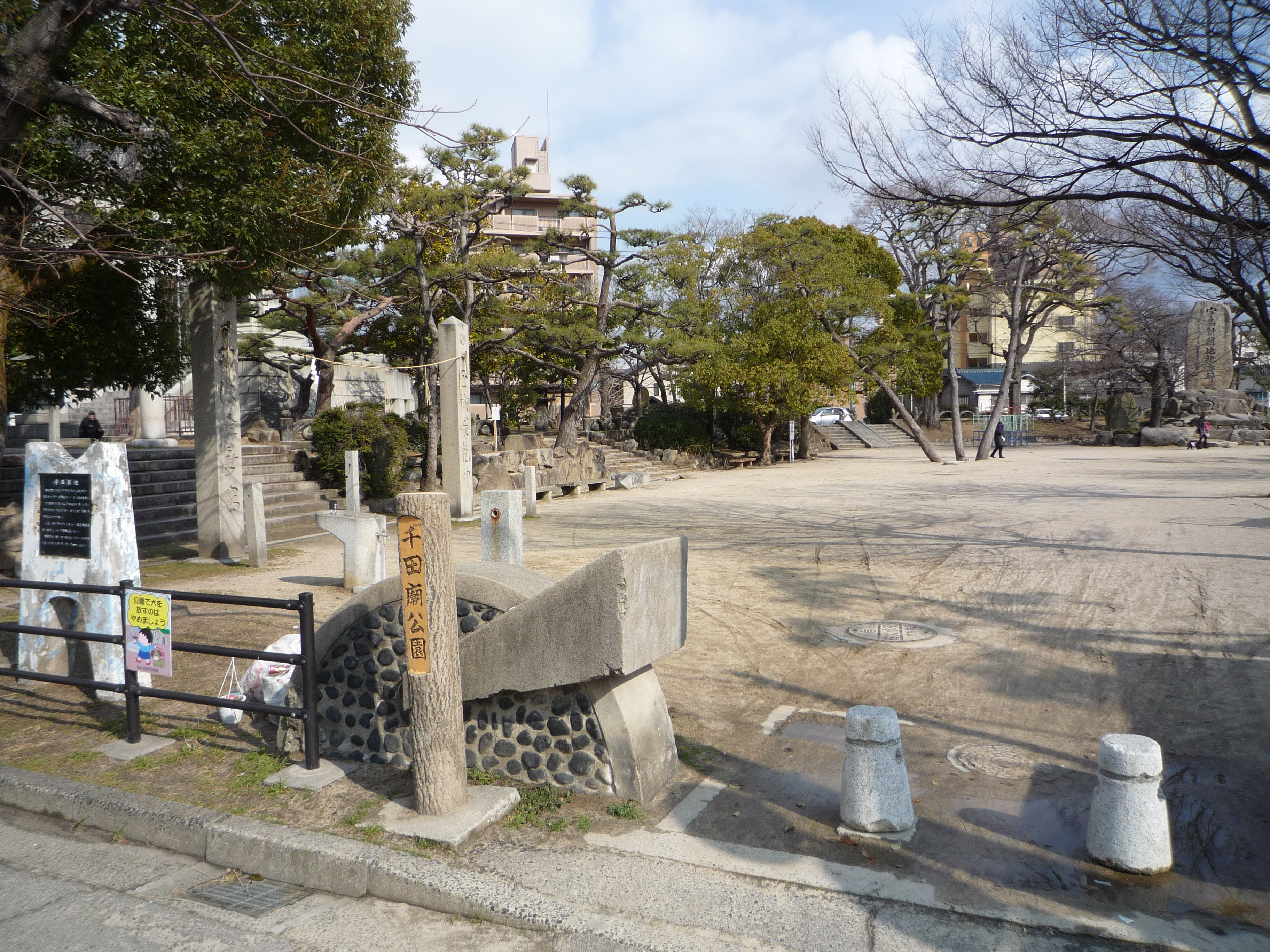 千田廟公園